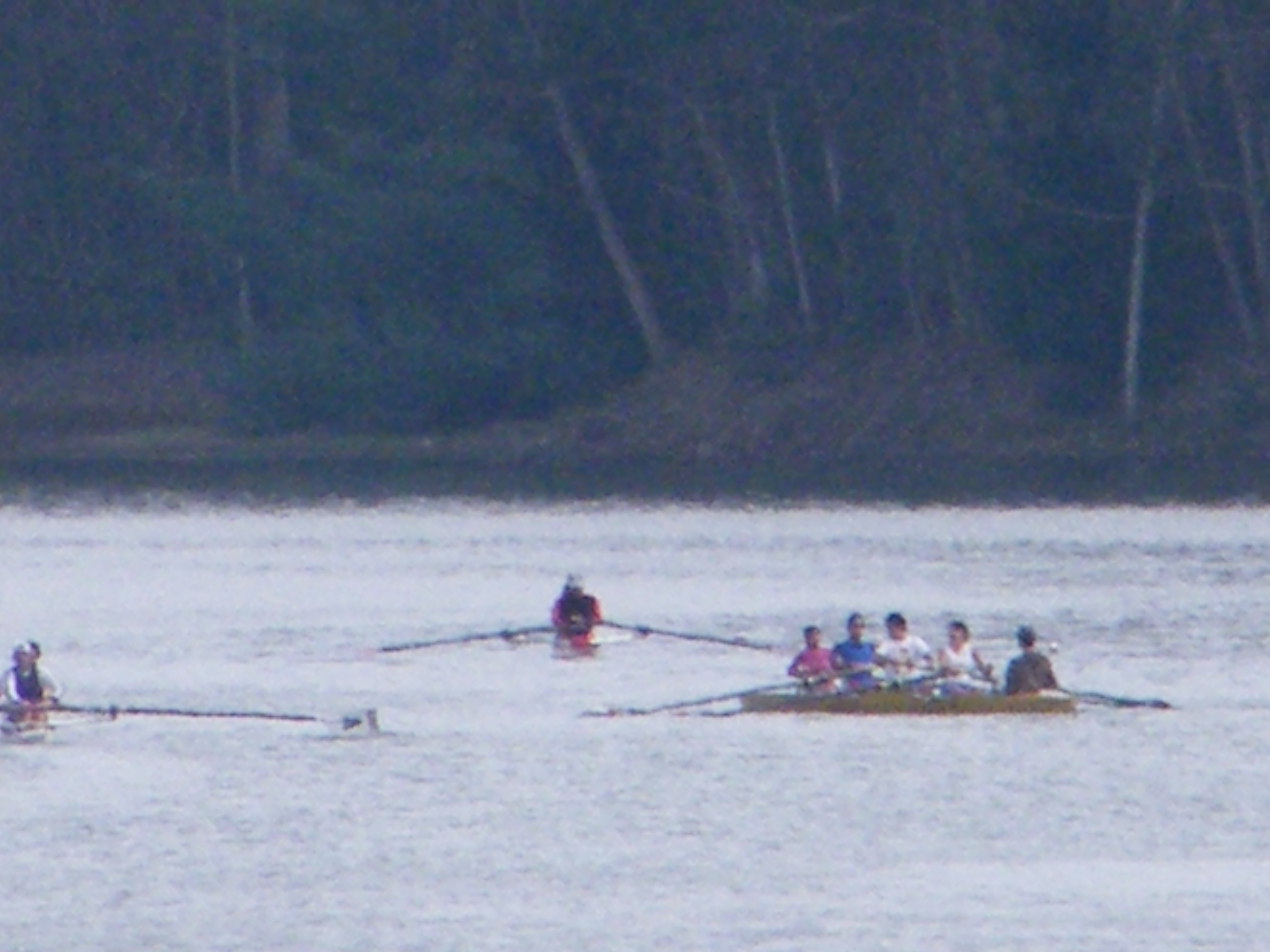 laguna La Luz